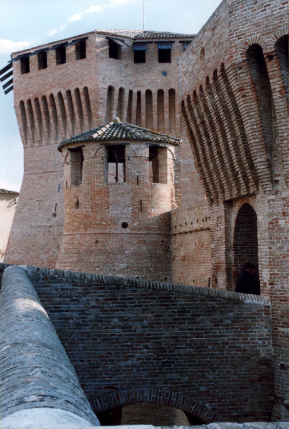 Mastio della Rocca Roveresca di Mondavio